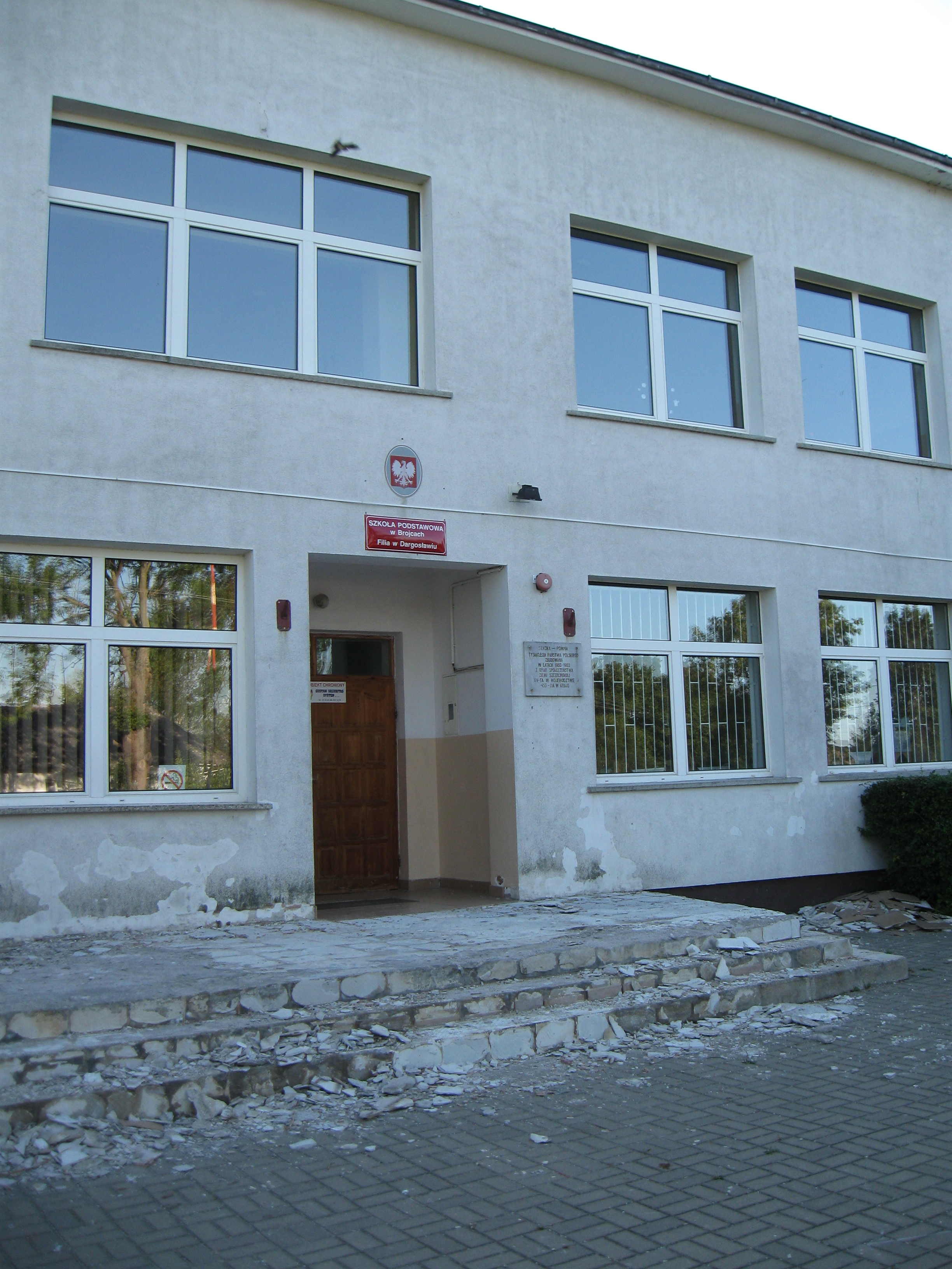 Szkoła Podstawowa w Dargosławiu - filia Szkoły Podstawowej w Brojcach